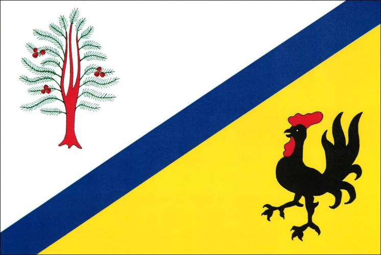 vlajka, Terešov, okres Rokycany